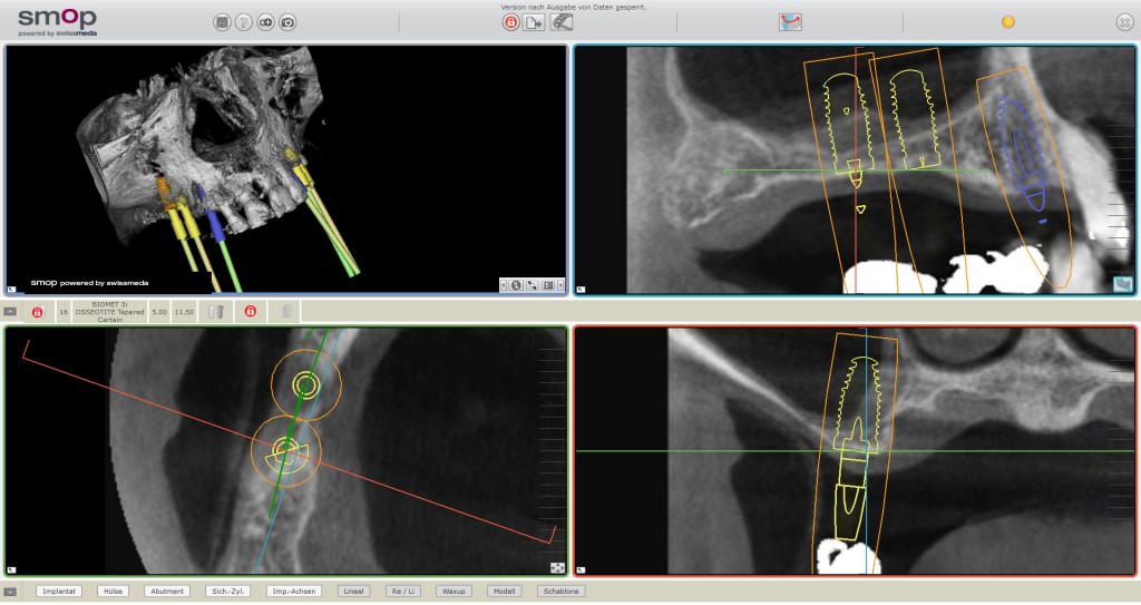 Ansicht eines Planungstools für die navigierte Implantologie.